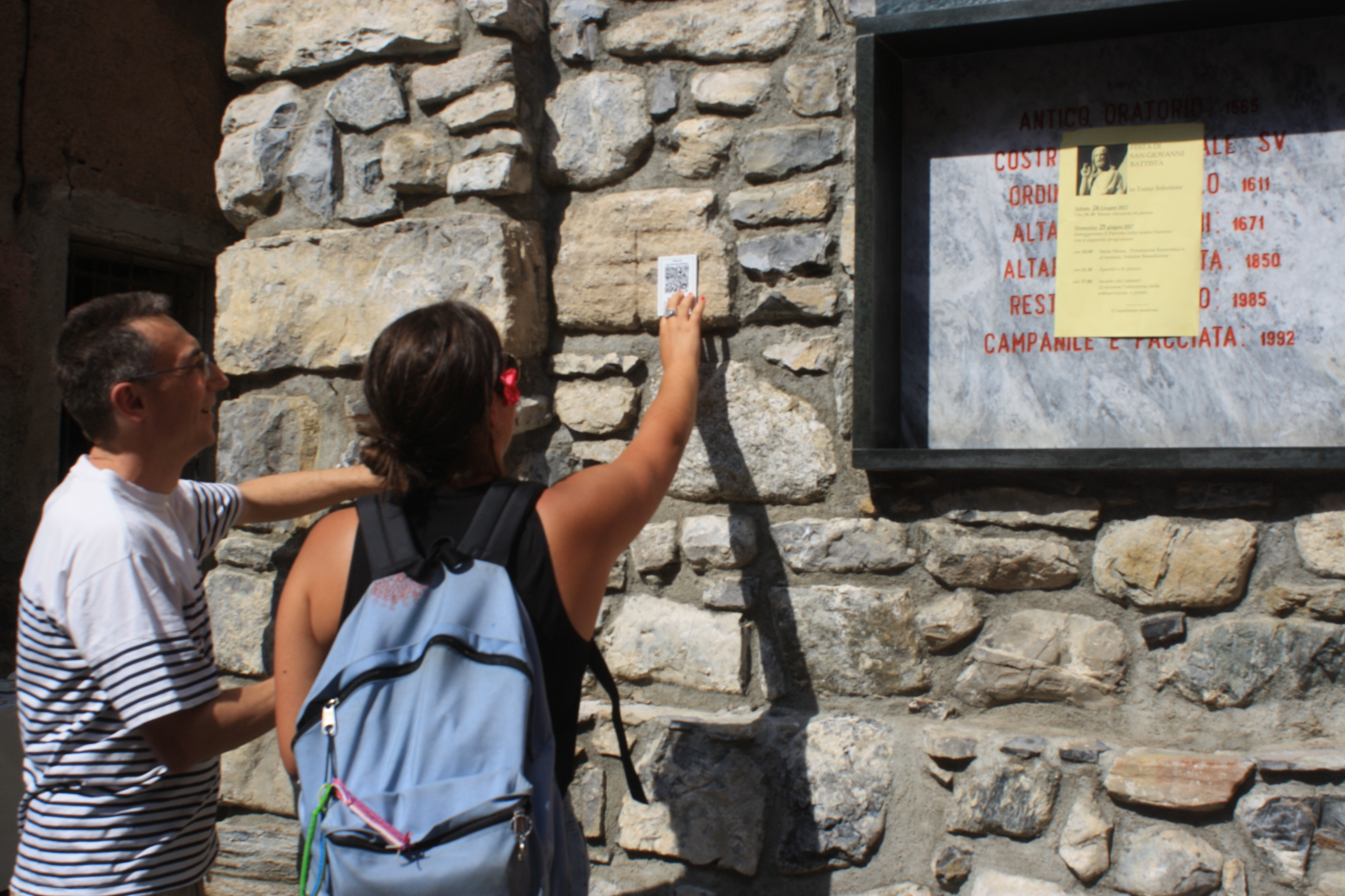 Applicazione di QRpedia codes a Esino Lario il 24 giugno 2017, a un anno da Wikimania Esino Lario.